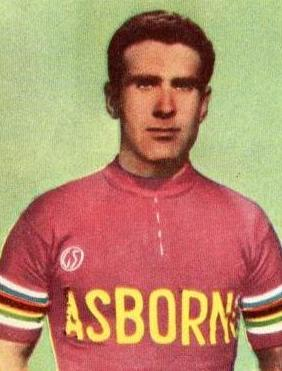 Il ciclista Guido Messina